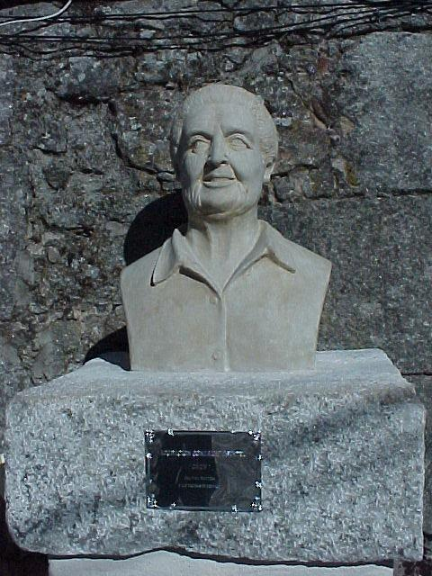 Busto a Adoracion